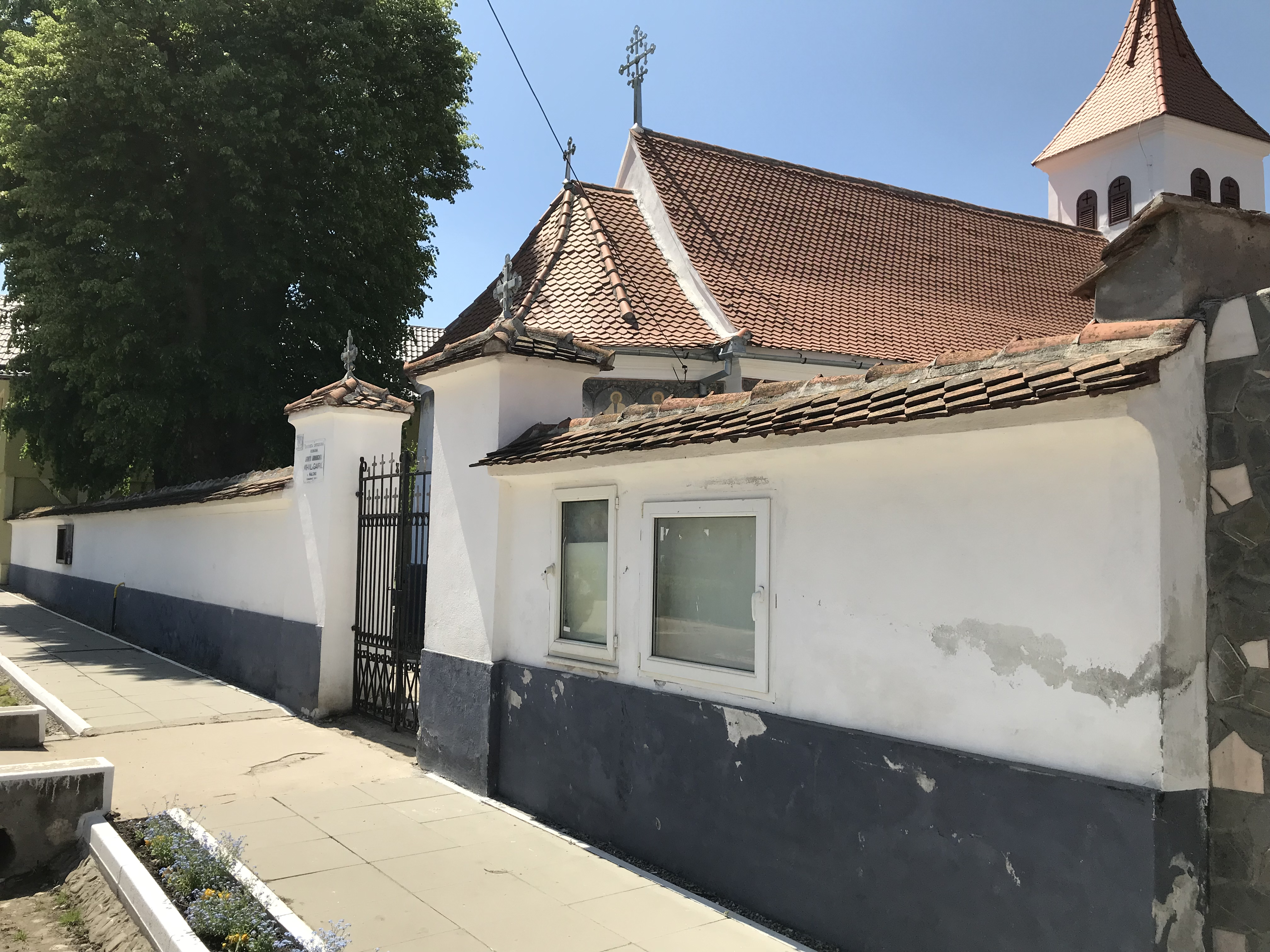 Zid de incintă al bisericii „Sf. Arhangheli”, sat Hălchiu, județul Brașov 02